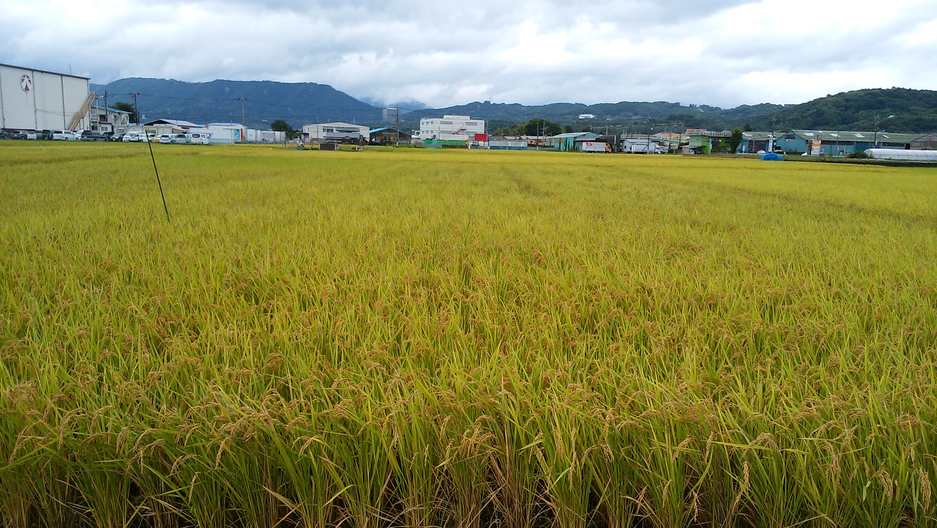 はるみの水田